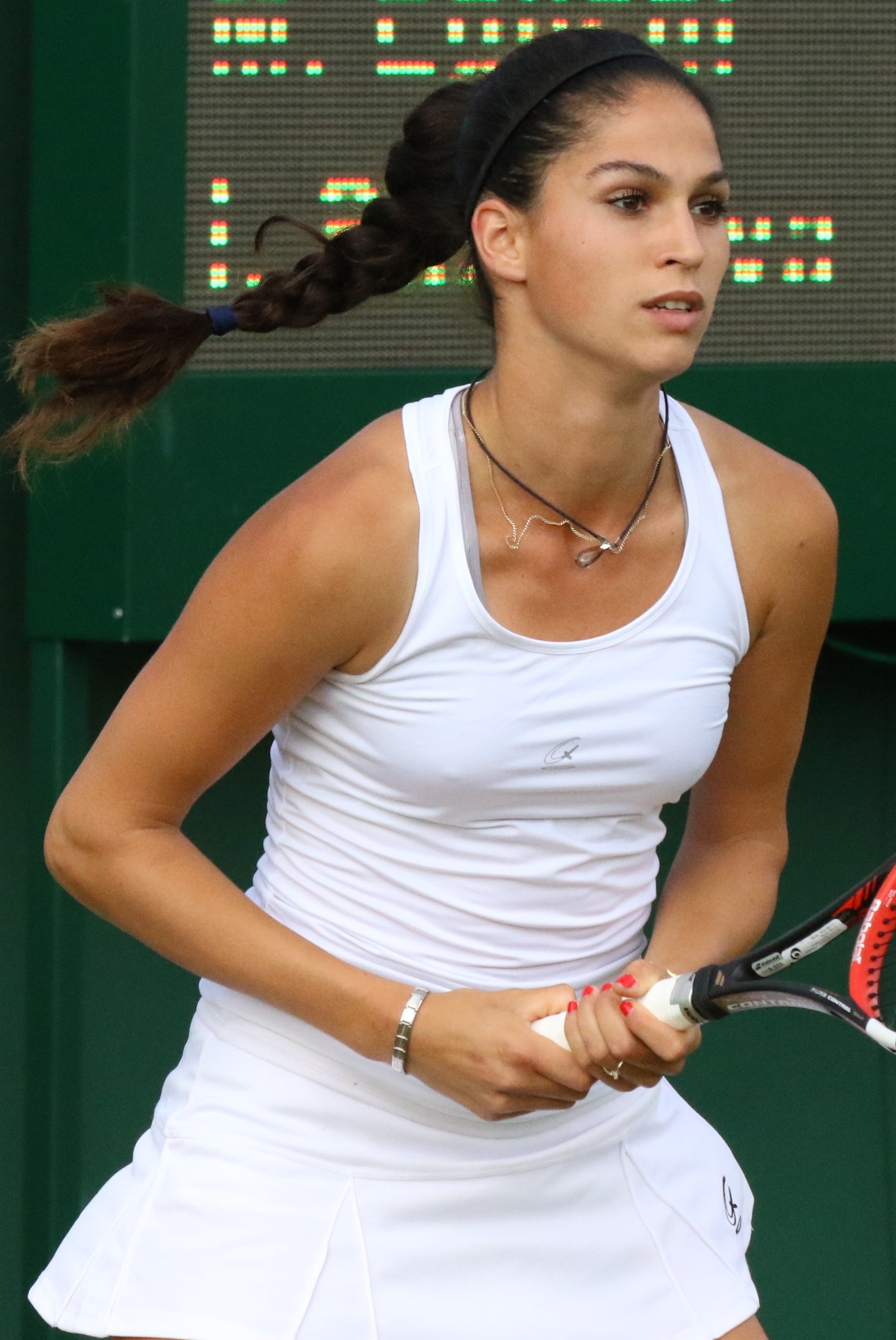 Shinikova WMQ16 (32)